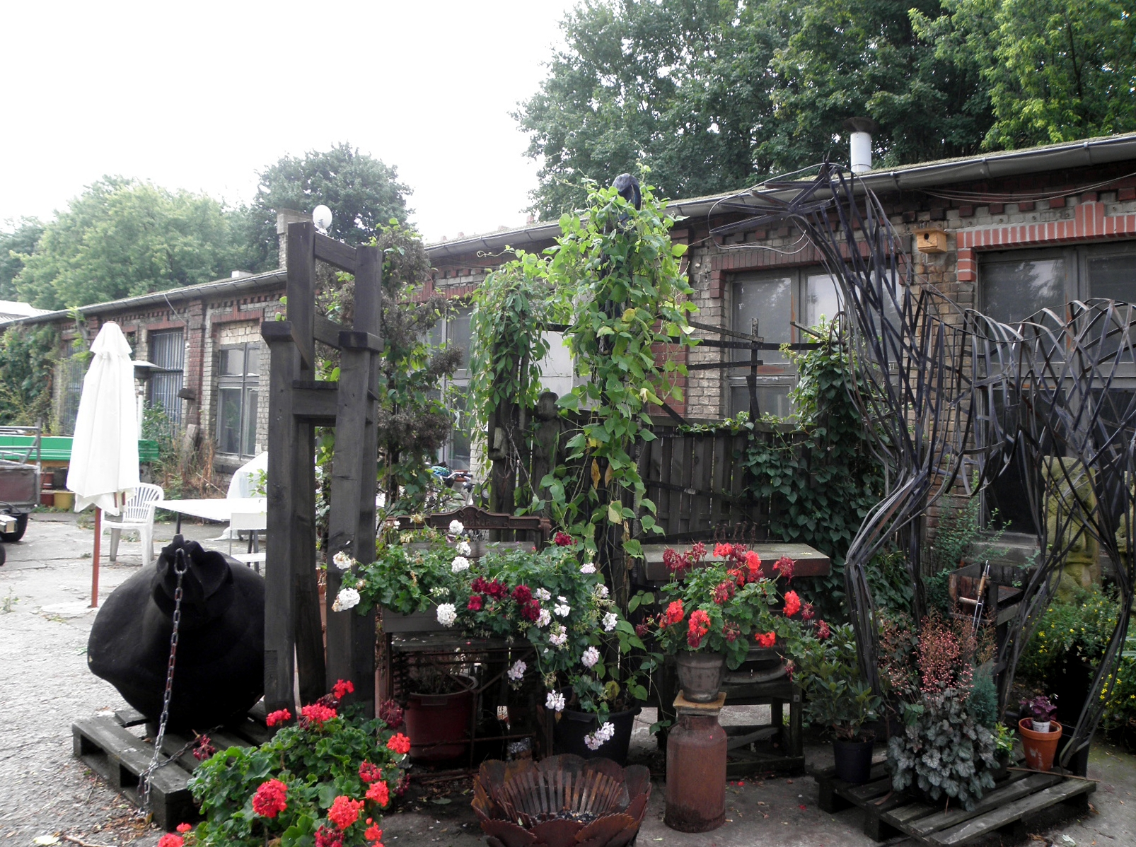 Werkstattgebäude auf dem Gewerbehof in Weißensee, ab 1930 von A. Kühn & Co. genutzt